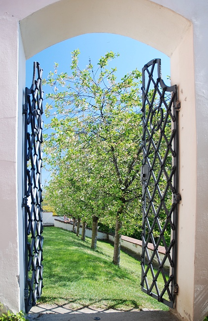 Malá Pálffyovská zahrada pod Pražským hradem